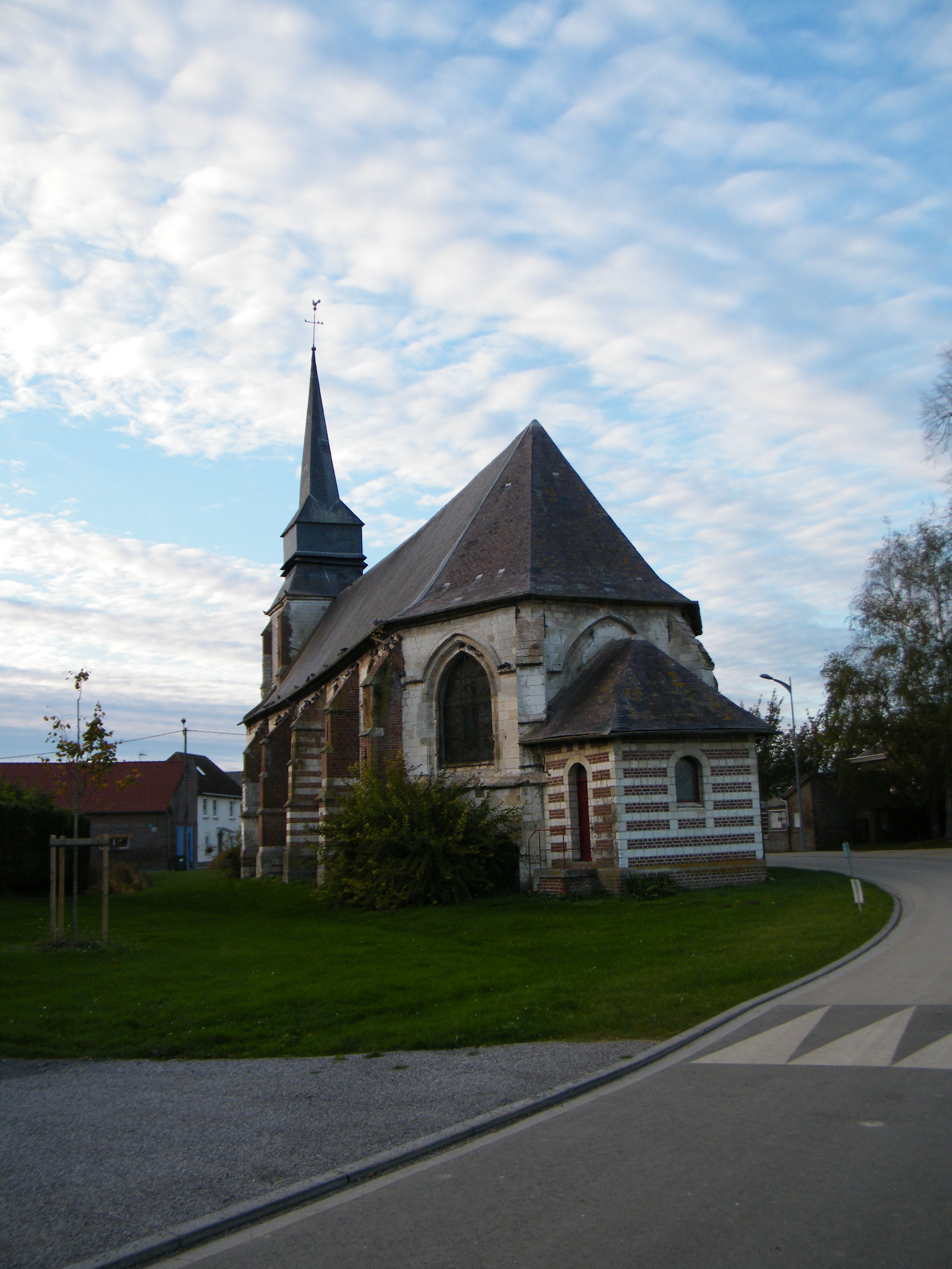 L'église.